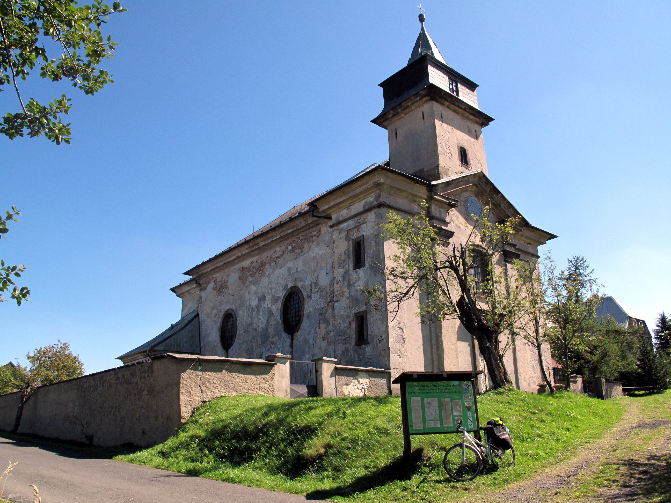 Kostel Nanebevzetí P. Marie (Cínovec), Cínovec